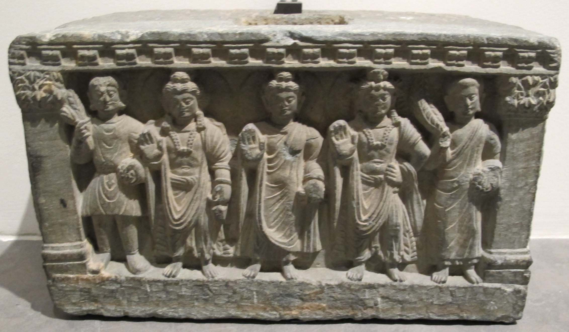 Afghanistan, triade buddhista, monaco e laico, regione di kapiça, monastero di shotorak, II-III sec.